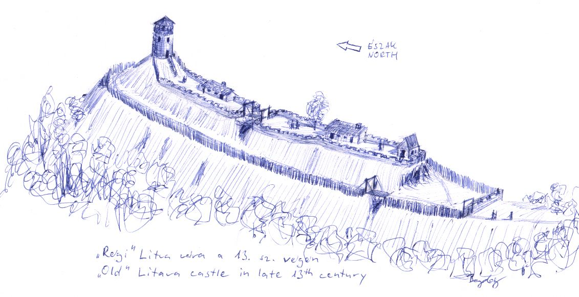 A "régi" Litva vár (szlovákul Litava, Haradnok) Cseritől (Cerovo) délnyugatra a Pusztavár-hegy (Pusty hrad) északi végében. Rekonstrukciós rajz a vár feltételezett 13. század végi állapotáról.